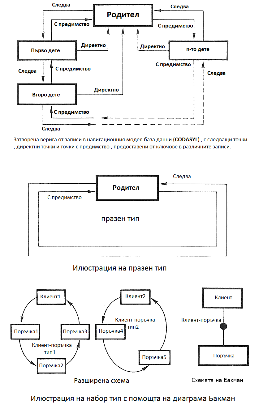 Основна структура на навигационна CODASYL модел база данни.